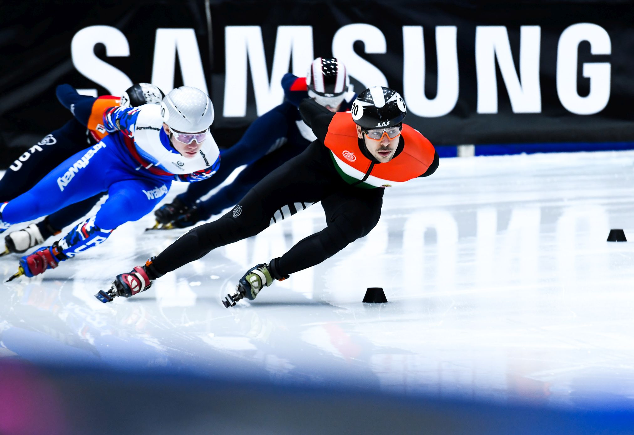 Burján Csaba olimpiai- és Európa-bajnok magyar rövidpályás gyorskorcsolyázó (középen) a dordrechti Európa-bajnokságon.